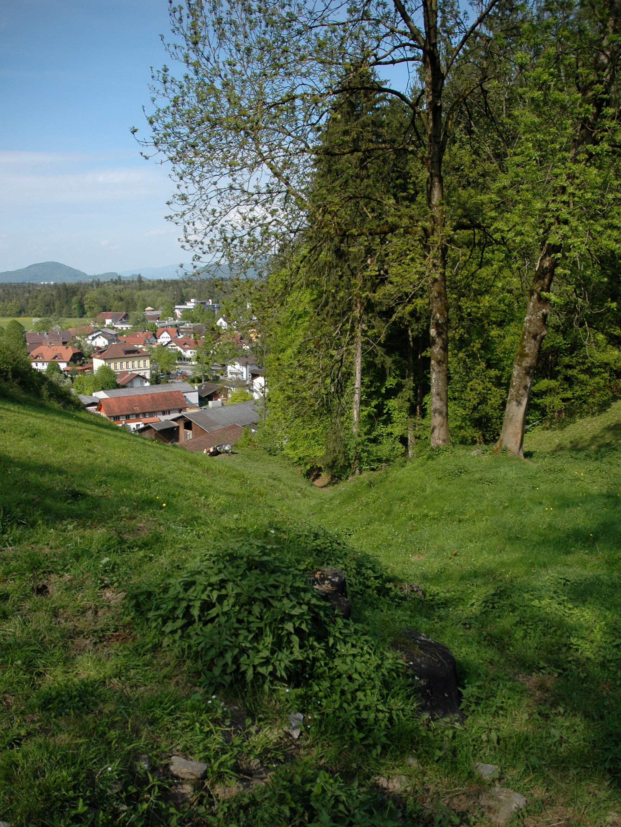 Nofels, "Gässele", alter Weg nach Fresch